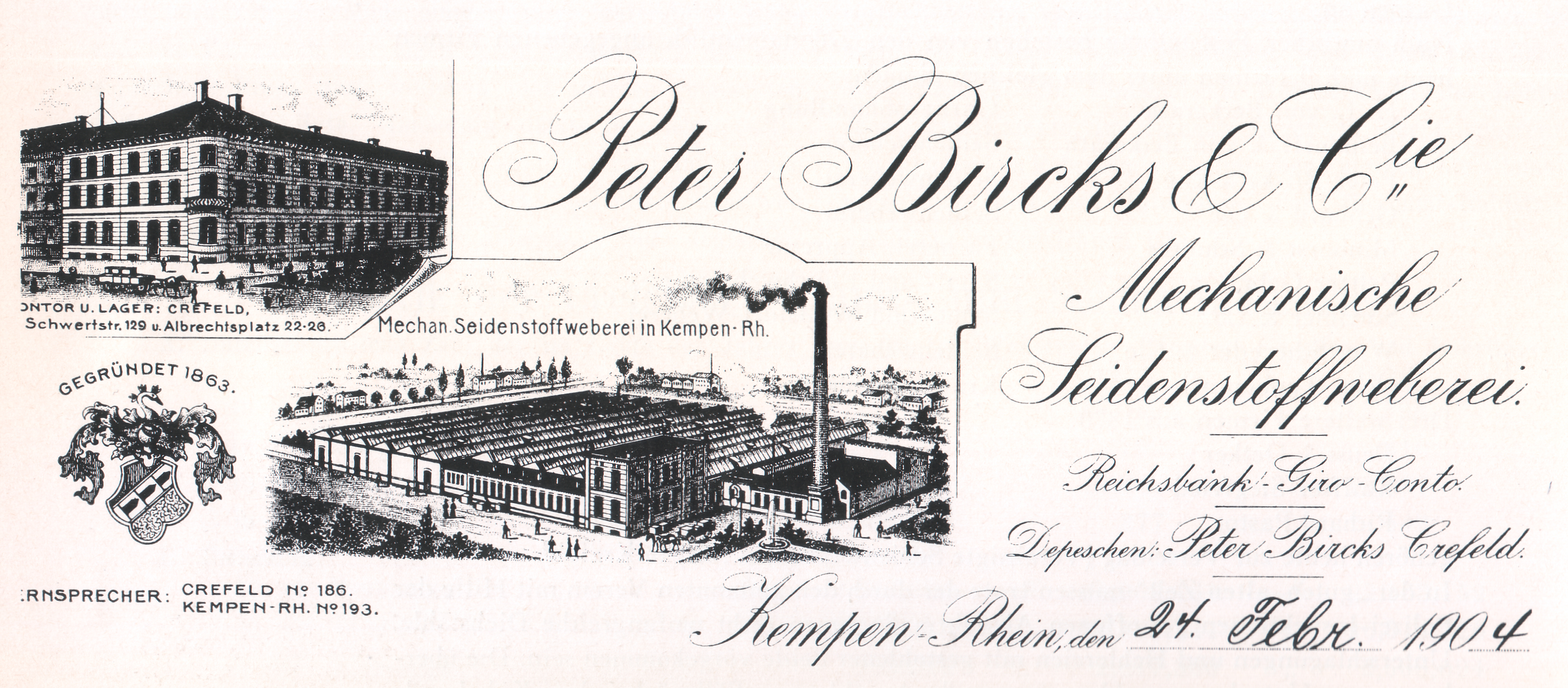 Peter Bircks & Cie, mechanische Seidenstoffweberei in Kempen Rh., 24. Februar 1904 (Briefkopf).